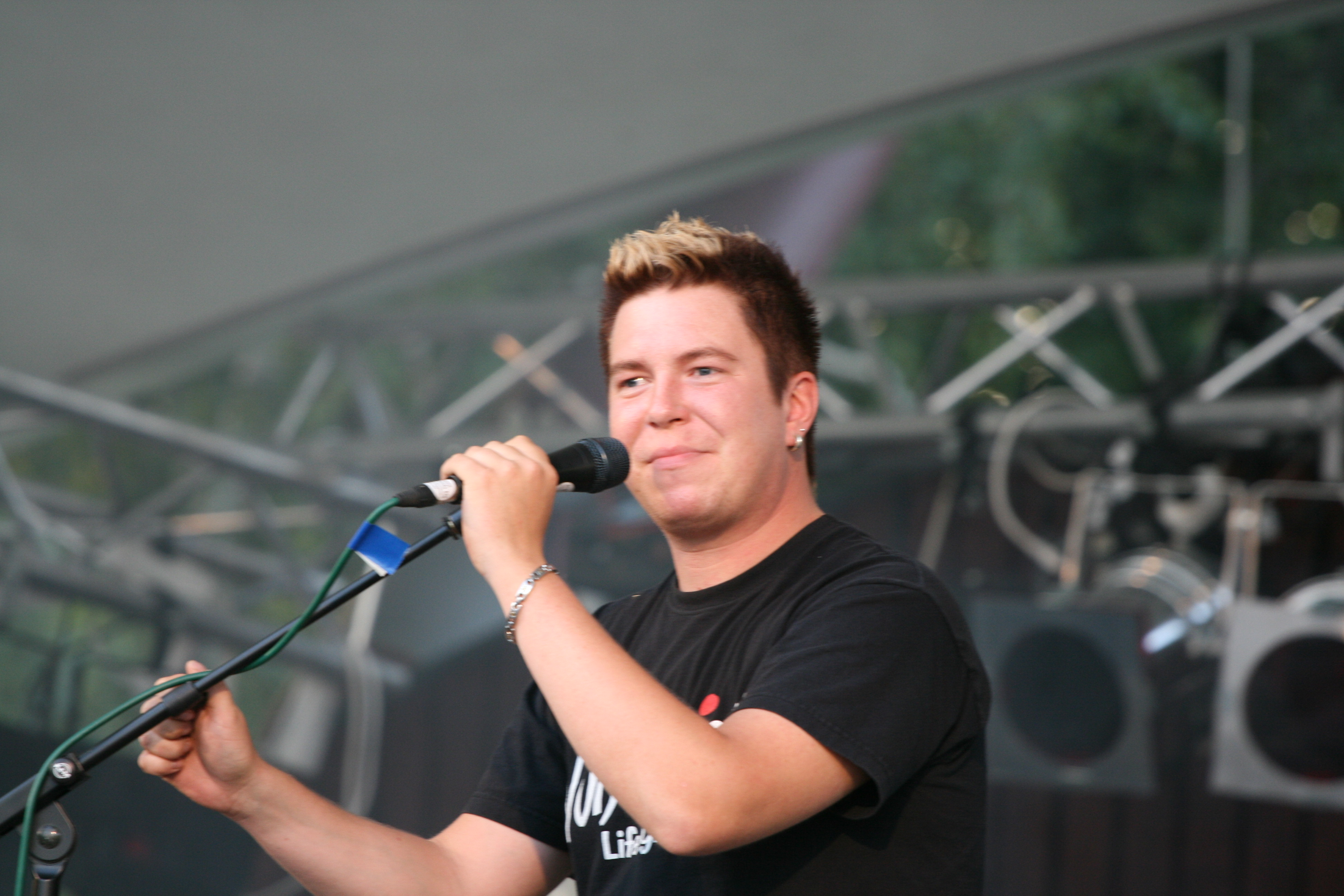 Jani Wickholm finnish singer